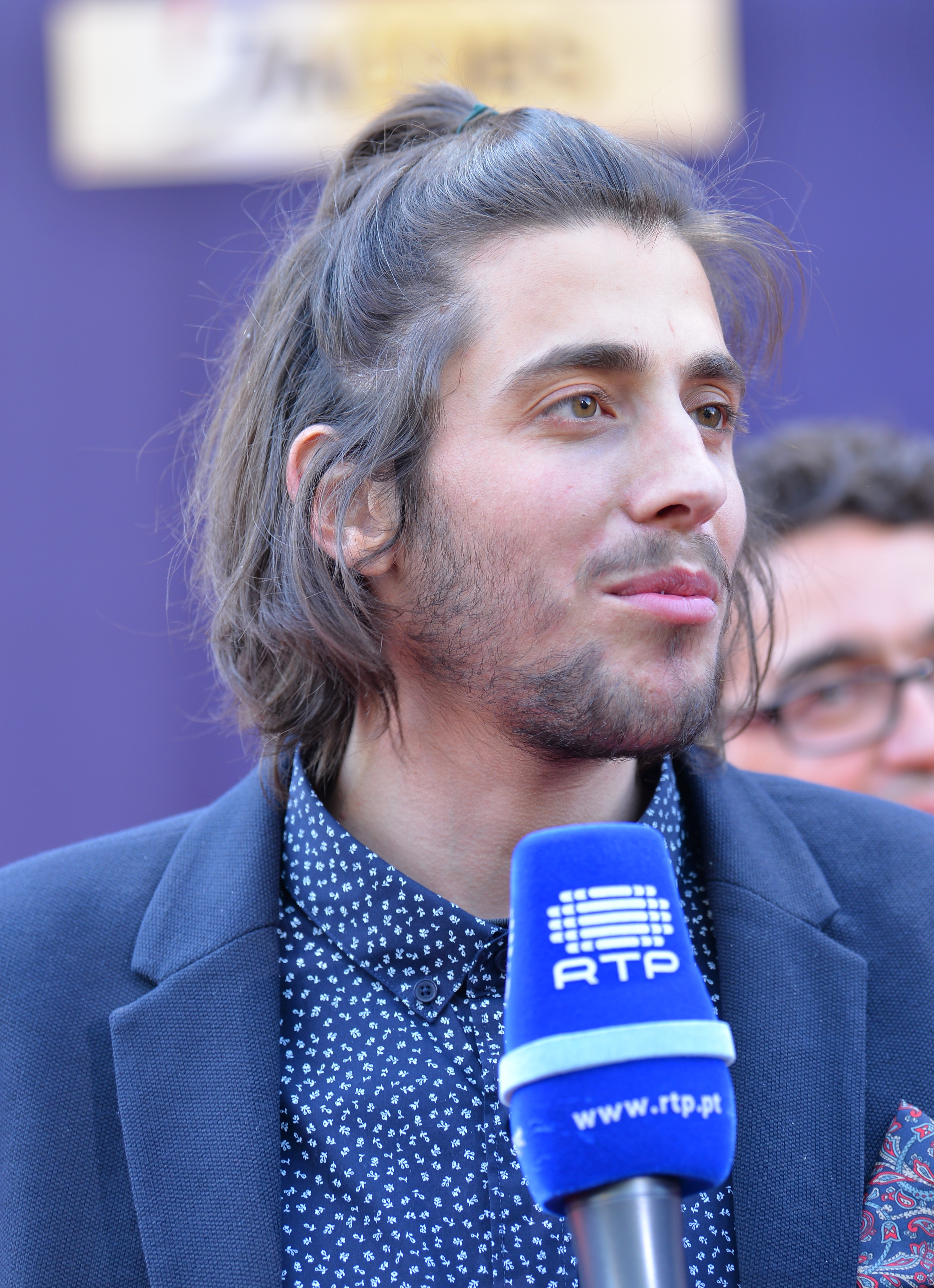 Португальський співак Сальвадор Собрал на пісенному конкурсі Євробачення 2017 у Києві